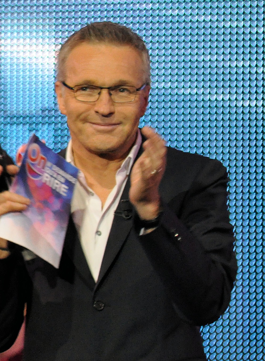 Laurent Ruquier au Casino de Paris, le 8 juin 2013